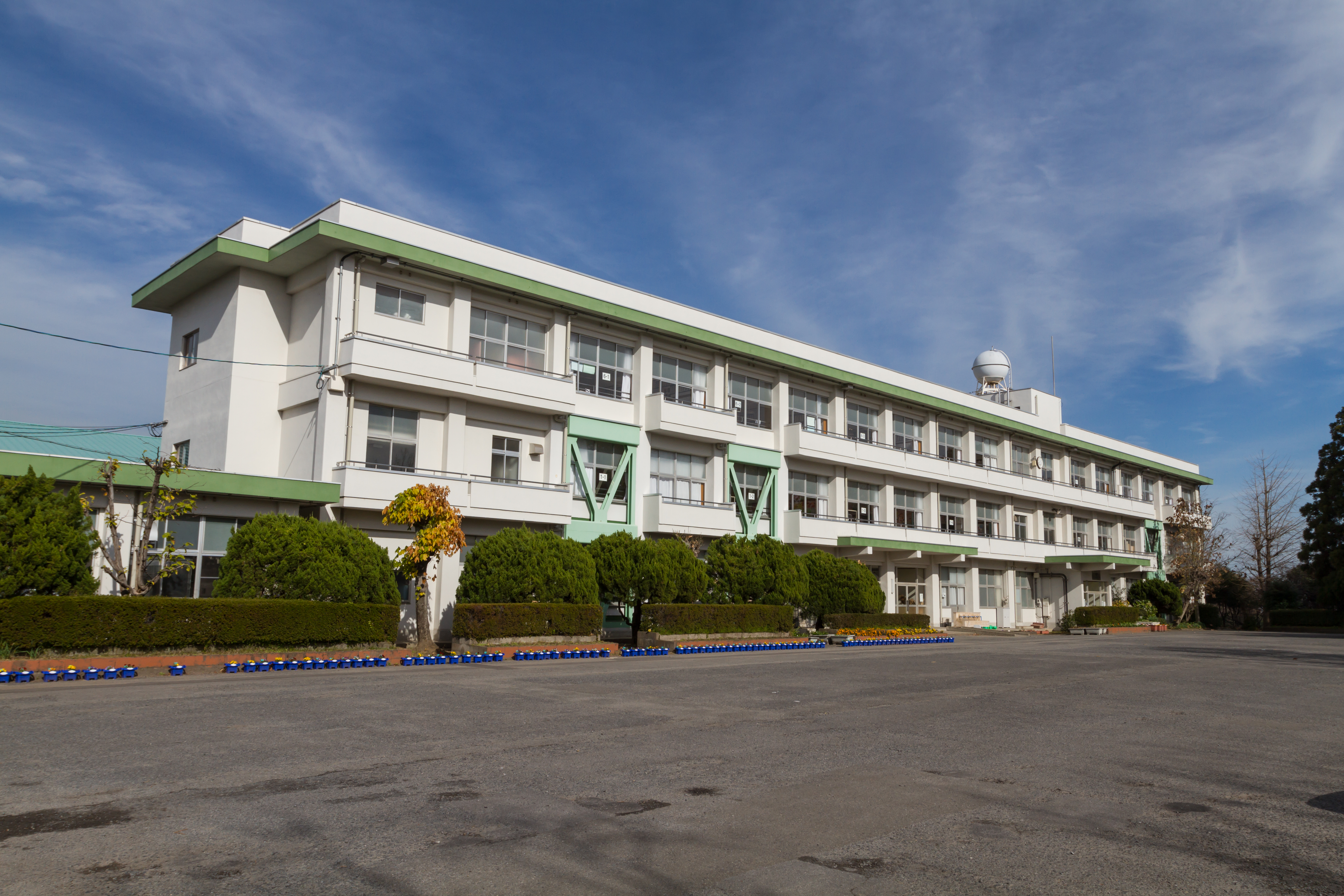 明野北小学校正門より撮影